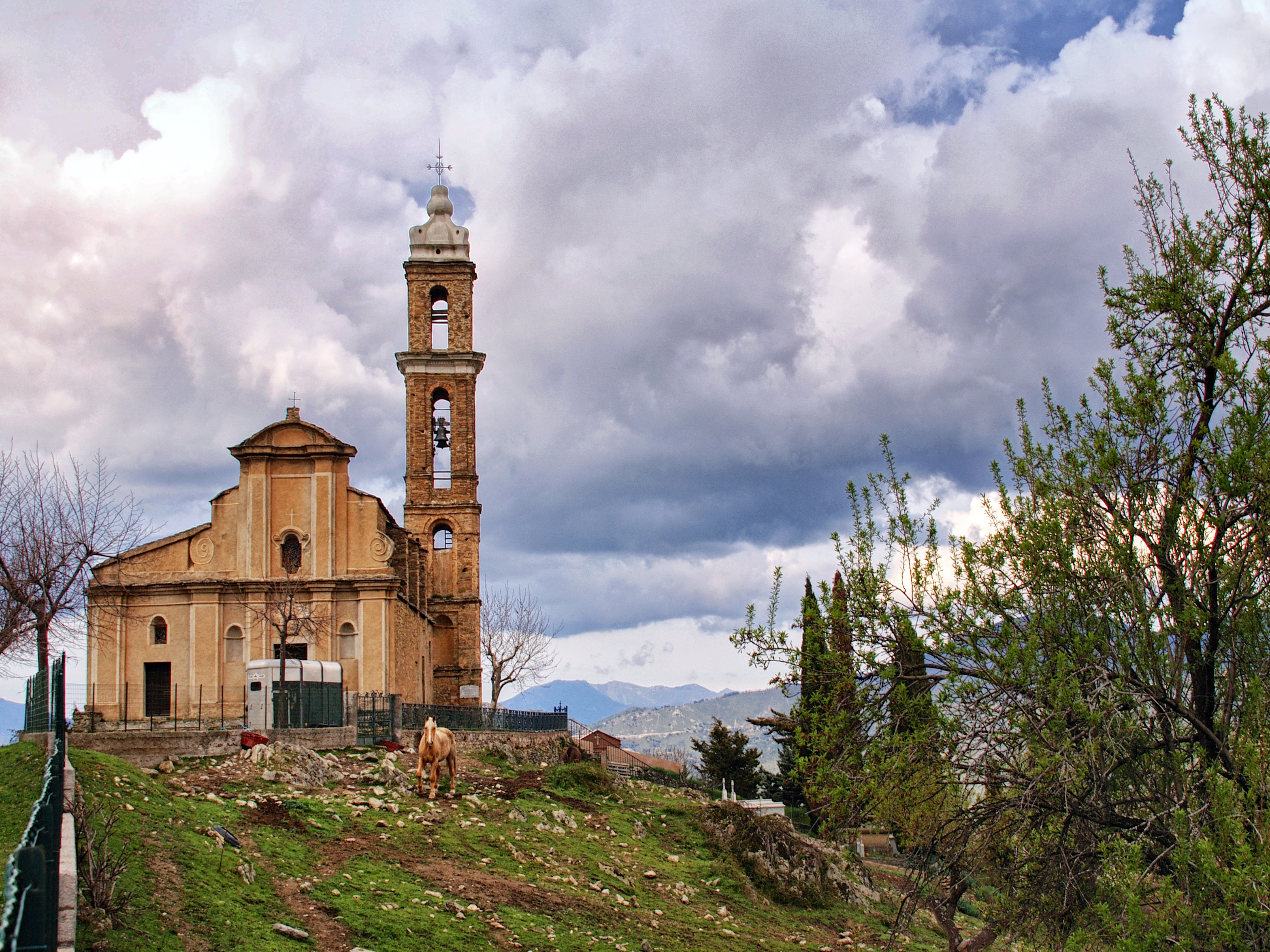 Aiti, Casaluna (Castagniccia / Corse) - Vue frontale de l'église Saint-Étienne